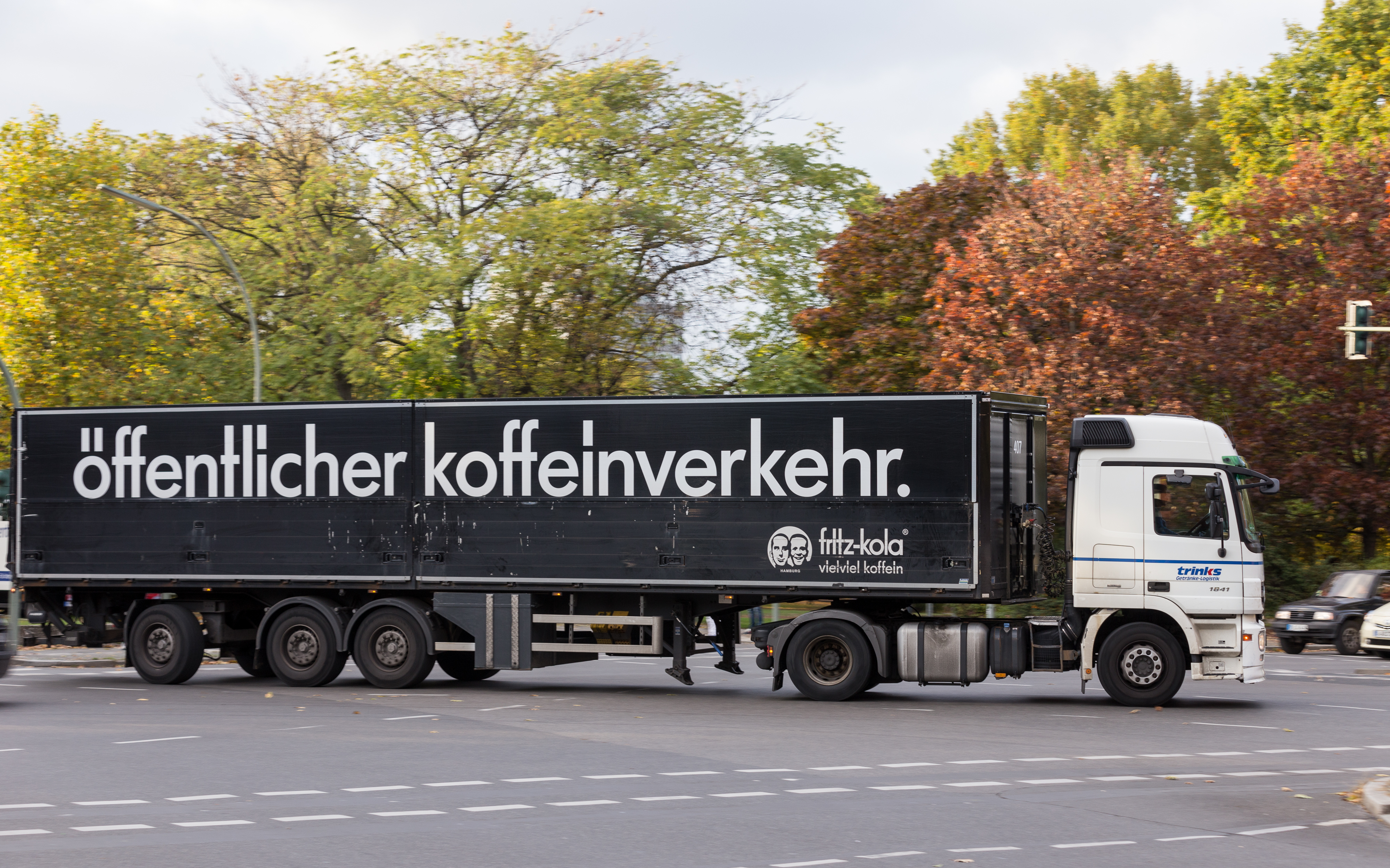 fritz-kola öffentlicher koffeinverkehr, Getränke-Logistik in Berlin